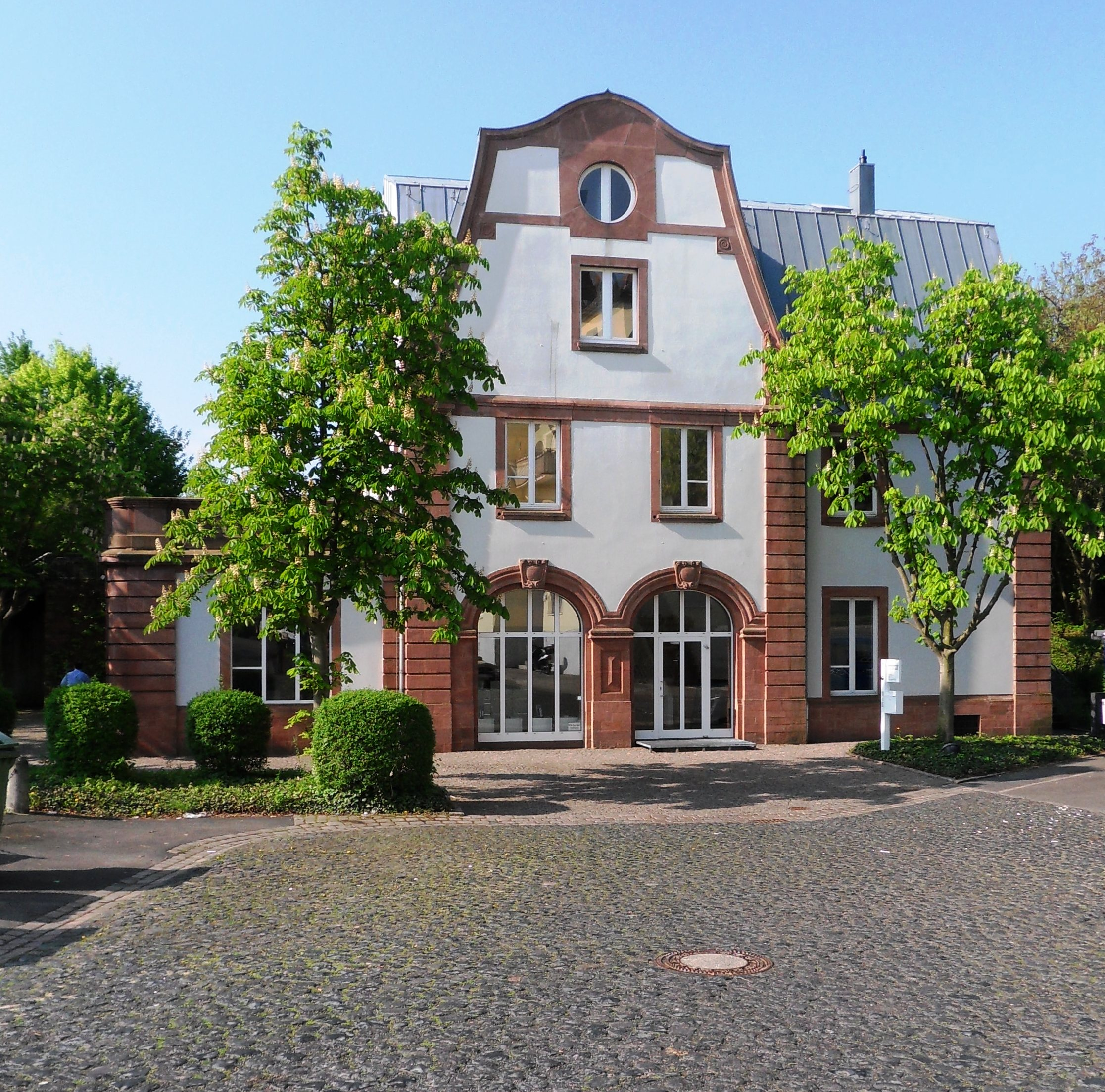 Früherer Bahnhof Waldstraße der Aartalbahn in Wiesbaden-Biebrich. Der Bahnsteig befindet sich in Höhe des 1. Stockwerks hinter dem Gebäude. Der Bahnhofsvorplatz ist mit einer in Wiesbaden nur selten anzutreffenden Pflasterung aus unregelmäßig behauenen Basaltsteinen befestigt.